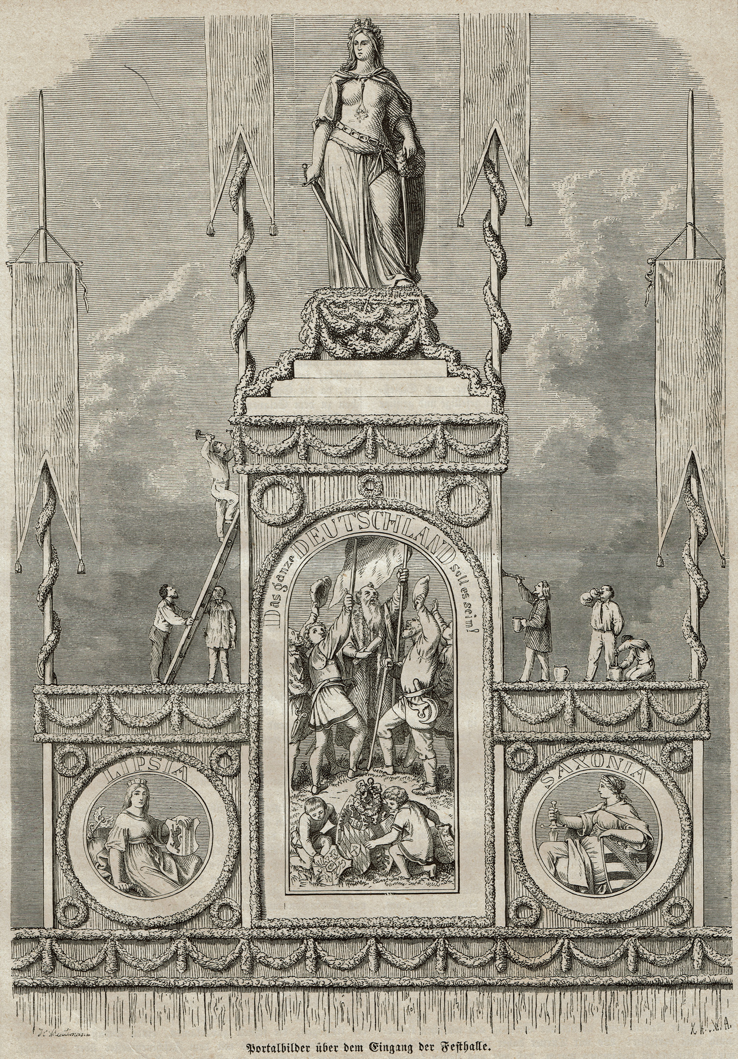 Allgemeines Deutsches Turnfest 1863 in Leipzig, Portalschmuck am Haupteingang der Festhalle